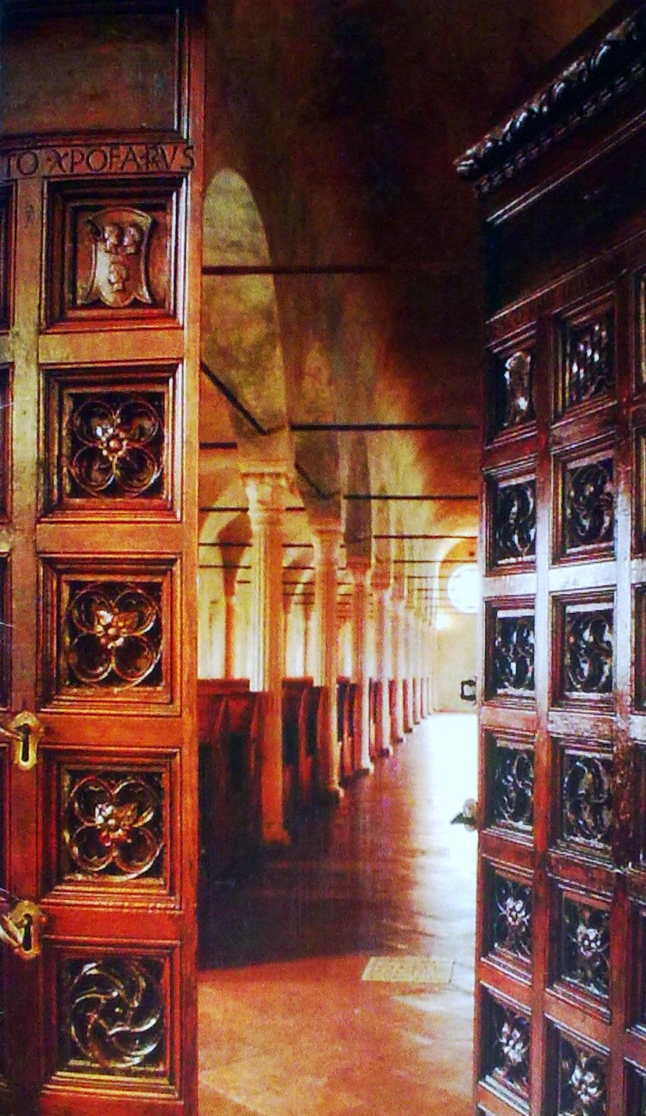 Entrata della biblioteca Malatestina